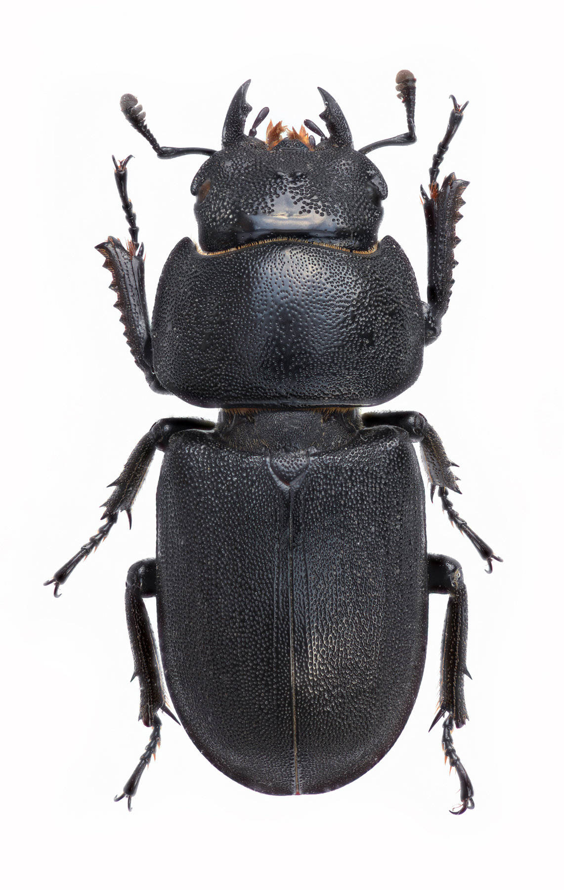 Dorcus parallelipipedus, female